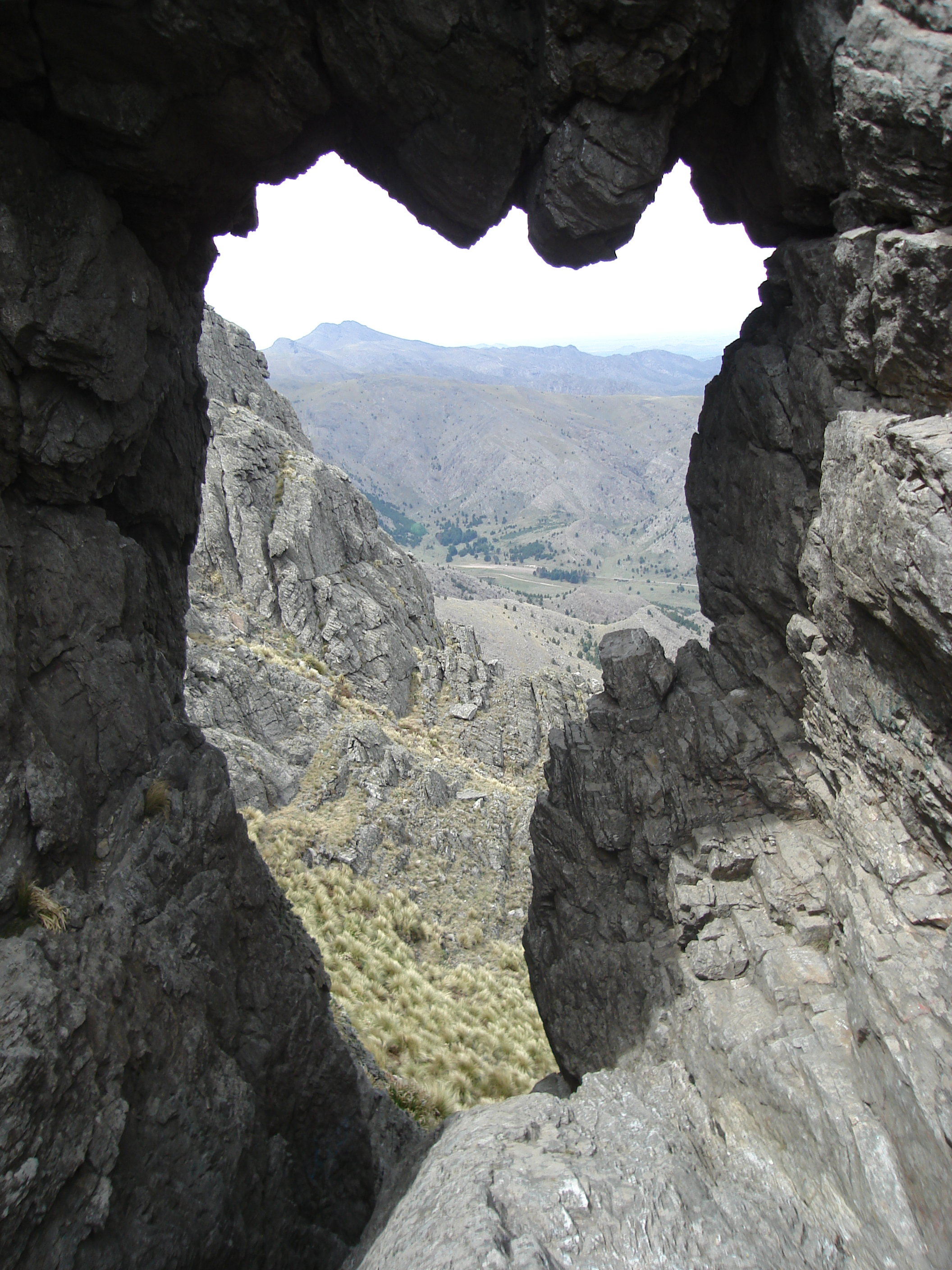 Ventana en la roca en Sierra de la Ventana.